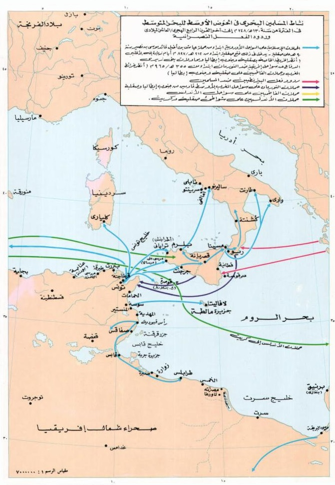 النشاط الجهادي البحري لِلمُسلمين في الحوض الأوسط لِلبحر المُتوسِّط في الفترة من سنة 748 إلى آخر القرن العاشر الميلاديّ.